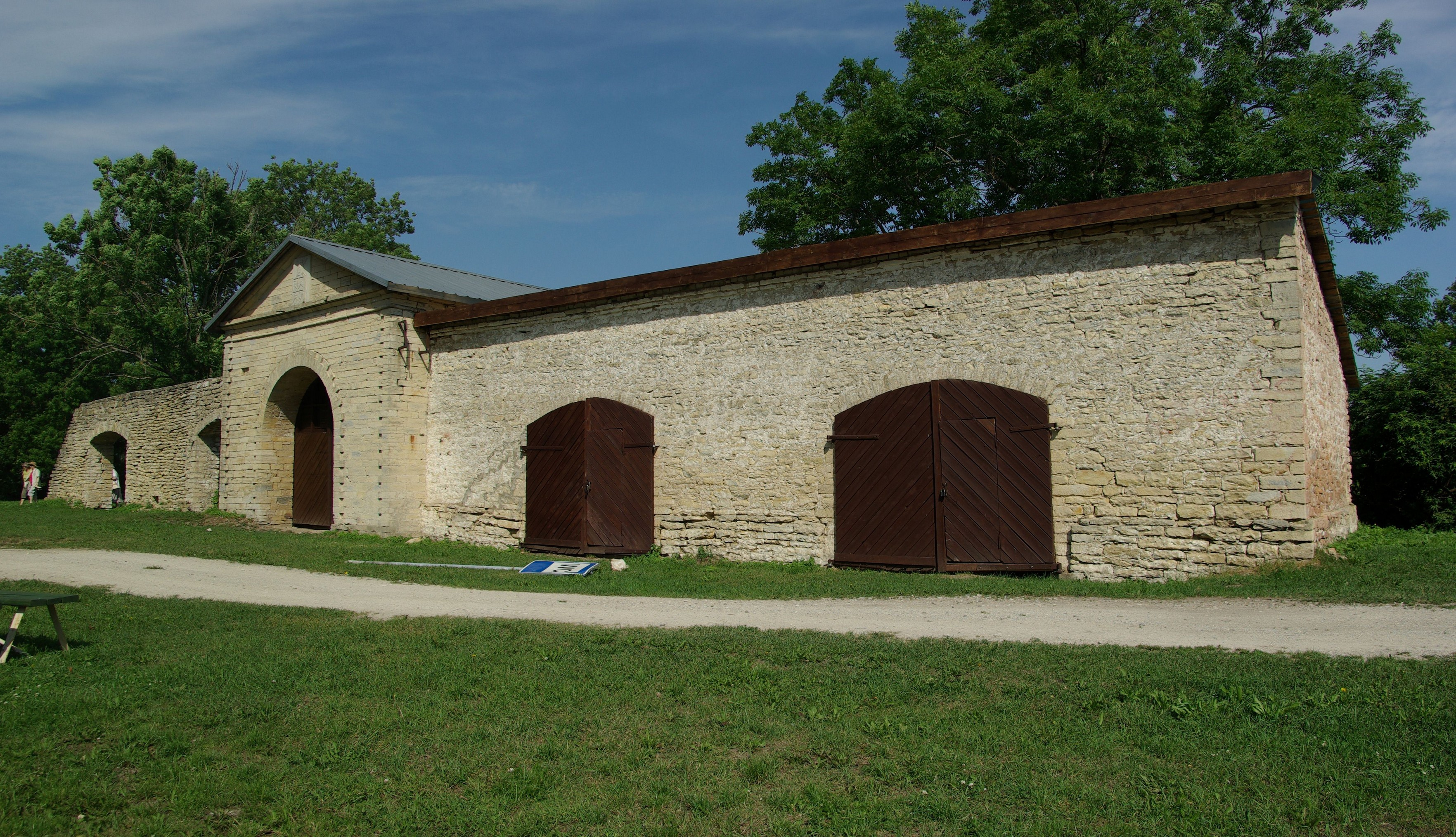 Lääne maakond, Lihula vald, Lihula linn